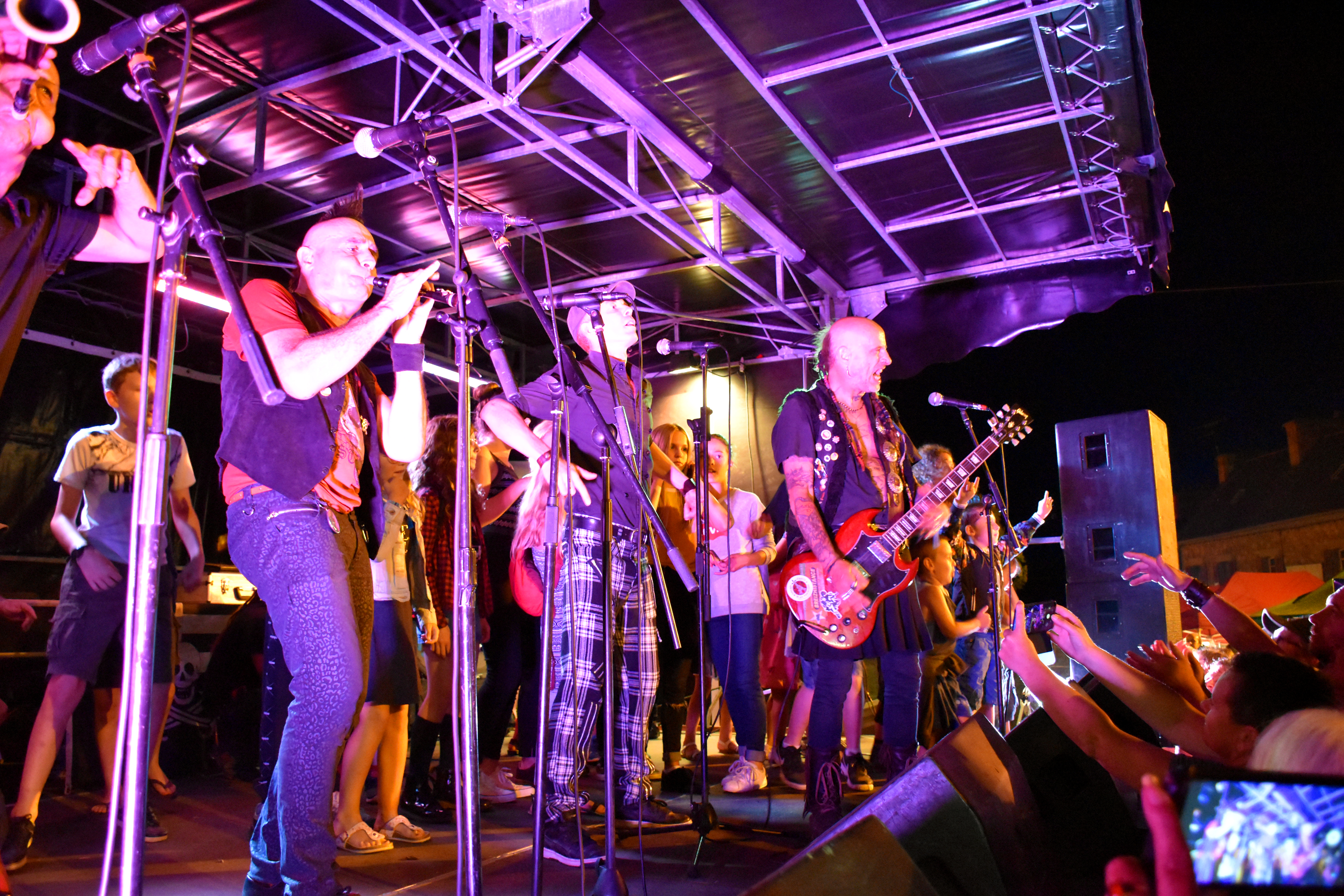 Les Ramoneurs de Menhirs à Plouha en 2019